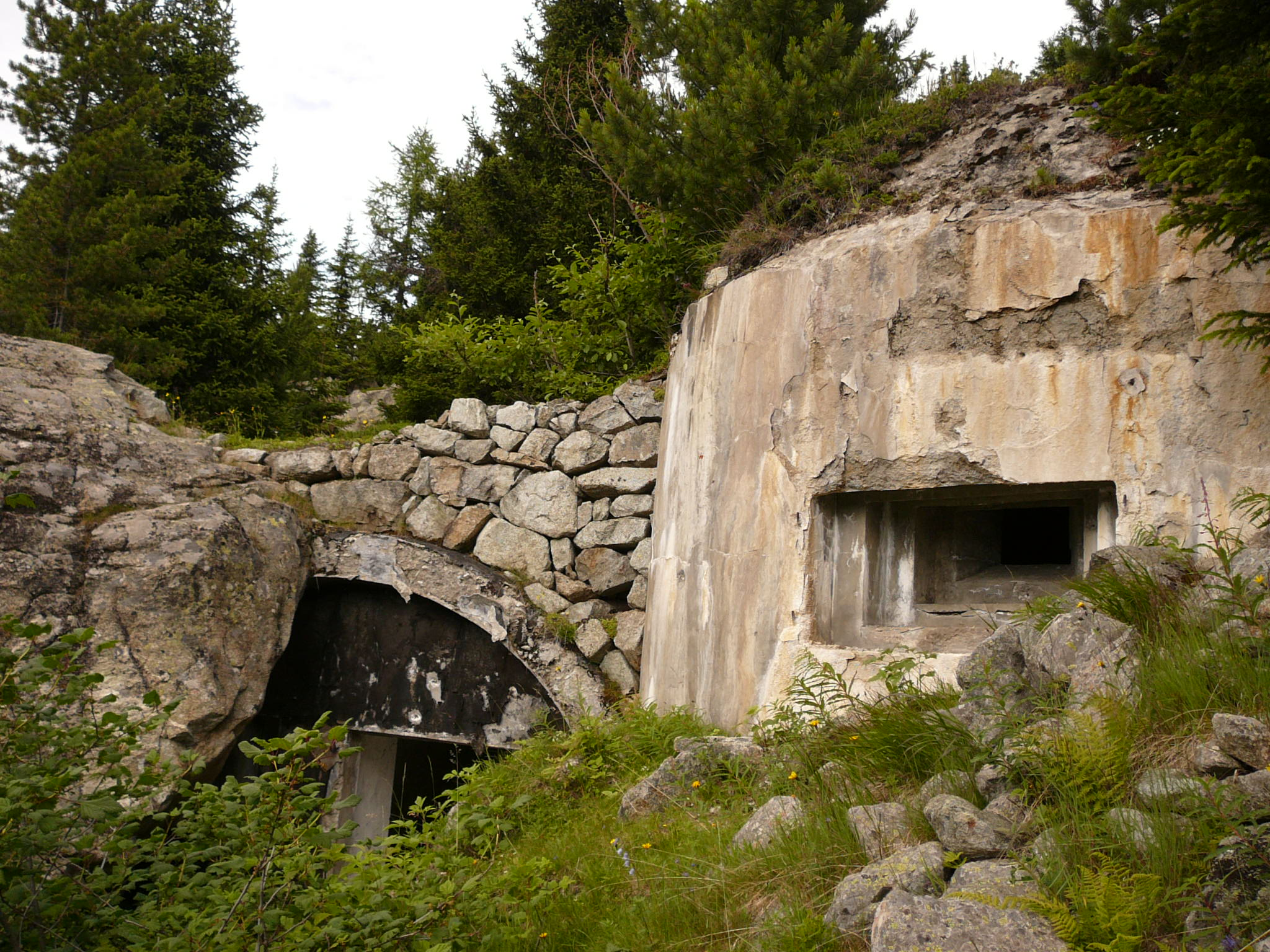 Pian dei morti poera 8